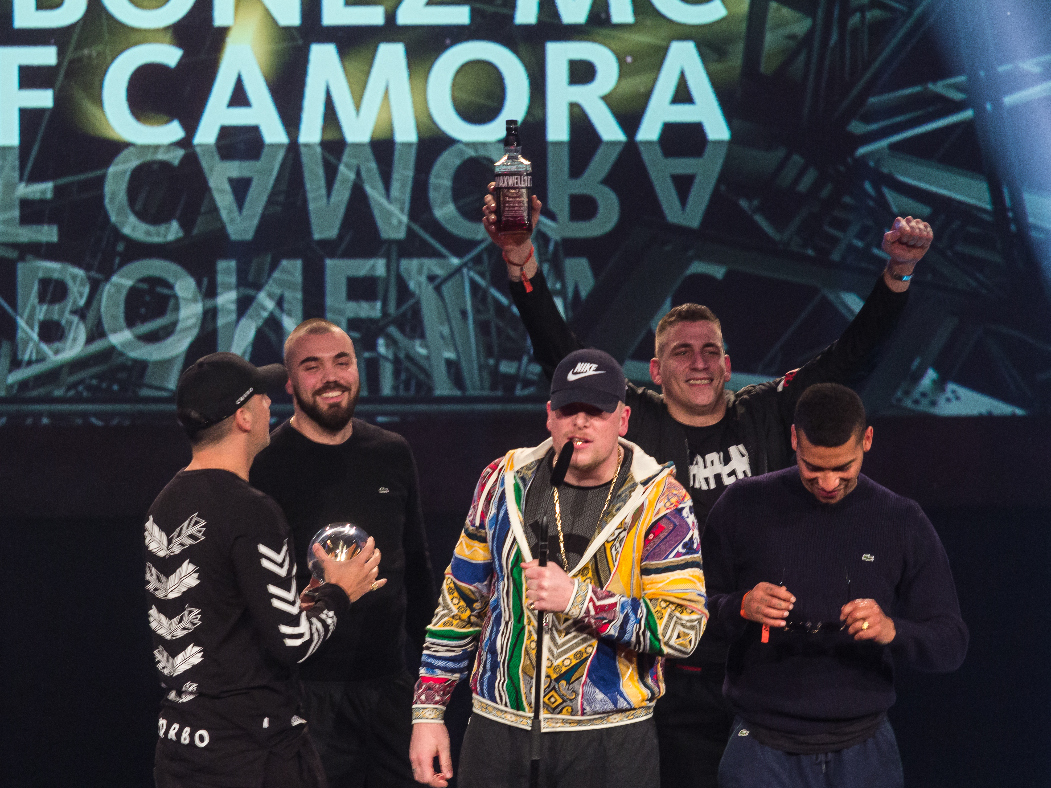 1LIVE Krone 2016 - 2015 - Show - Bester Hip-Hop-Act: Bonez MC & RAF Camora